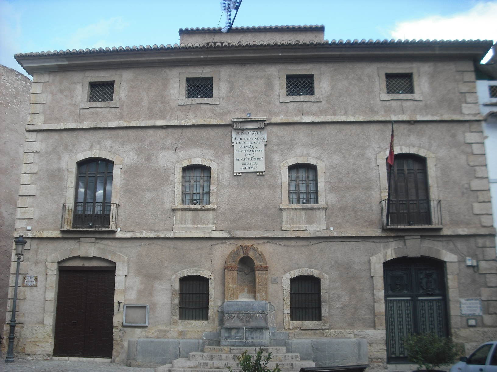 Museo Arqueológico y Etnológico de Segorbe.